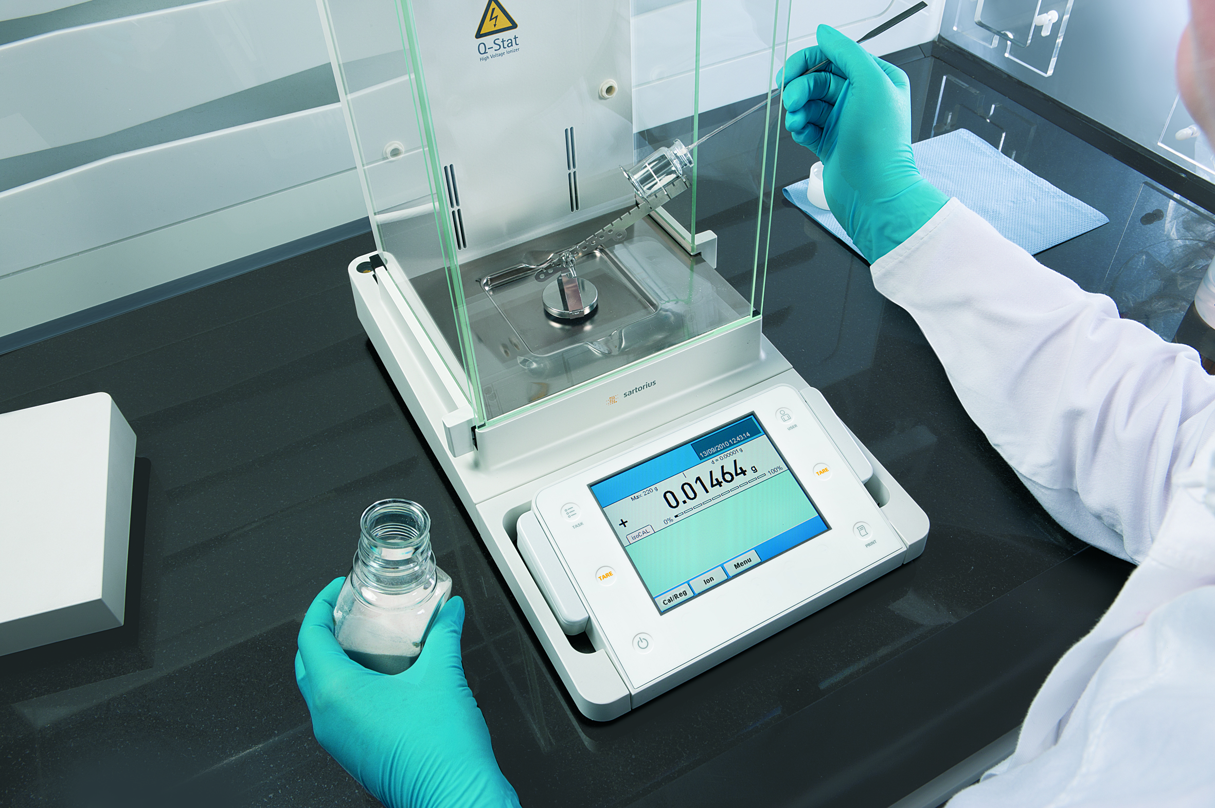 Bilancia Analitica Elettronica ad Alta Presione - Sartorius - Questo tipo di modello è utilizzato sia in campo farmaceutico sia in campo accademico